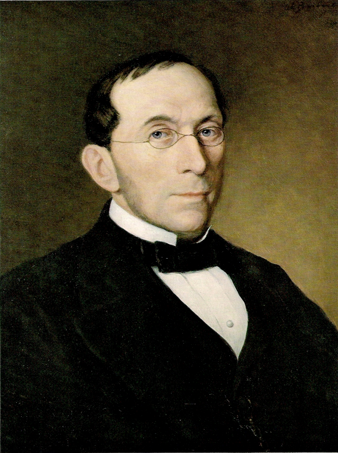 Portrait Emil Pfeifer, Zuckerfabrikant Datum: um 1860 Quelle: Hinweis: Urheberschutz abgelaufen